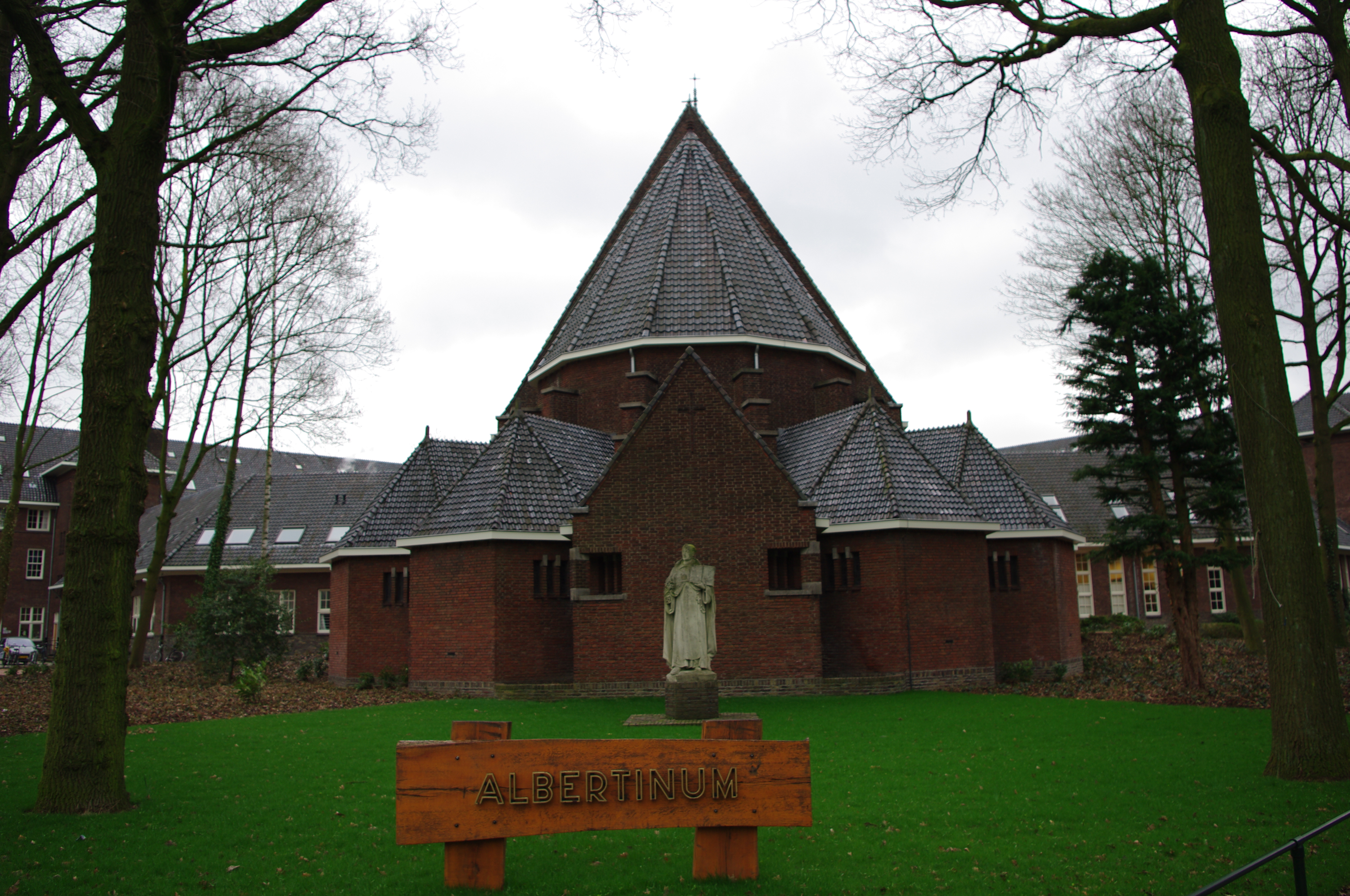 Het Albertinum in Nijmegen. (rijksmonument nummer 508798)